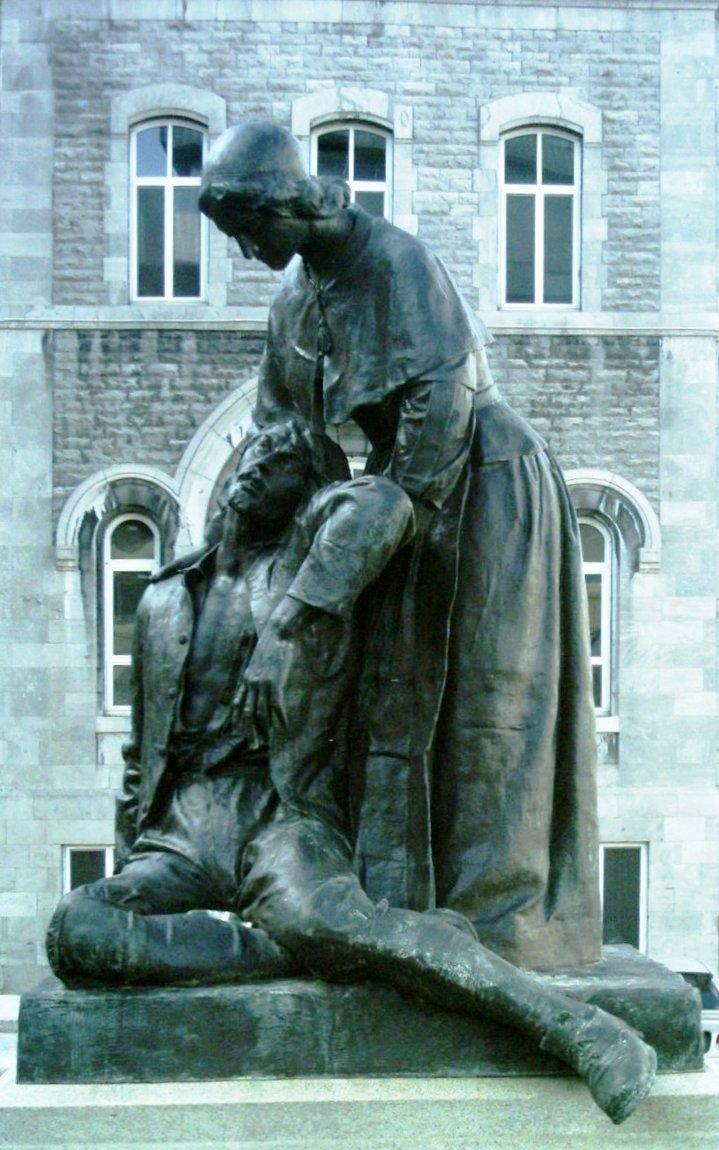 Jeanne Mance au secours d'un blessé. Bronze de Louis-Philippe Hébert placé devant l'hôtel-Dieu de l'avenue des Pins à Montréal.